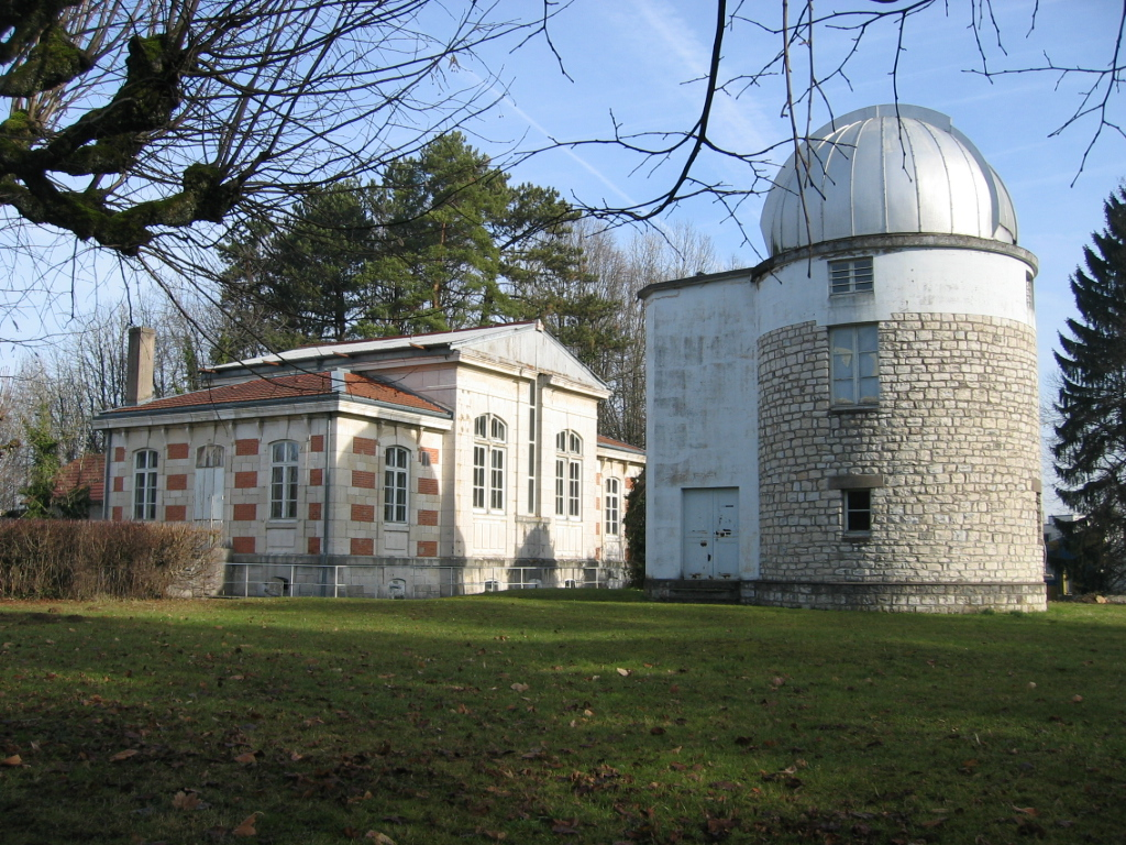 Observatoire de Besançon - Franche-Comté